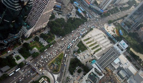 深圳塞車